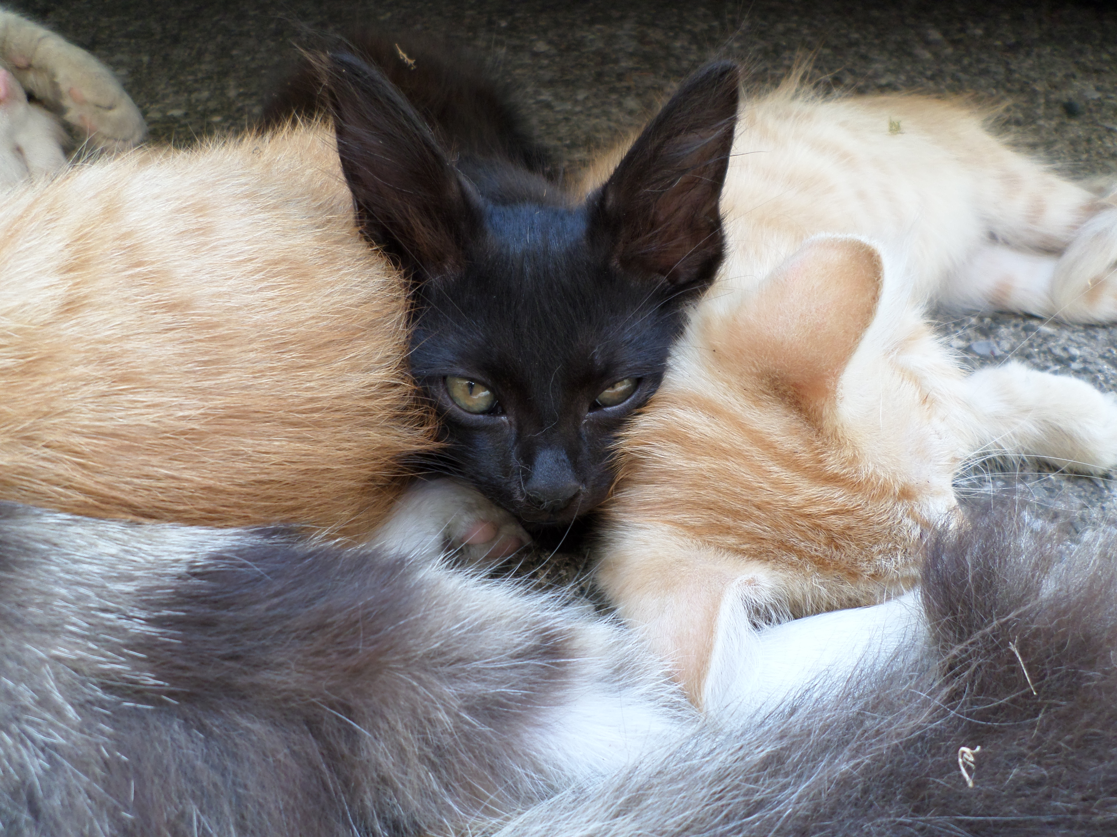 gattino europeo